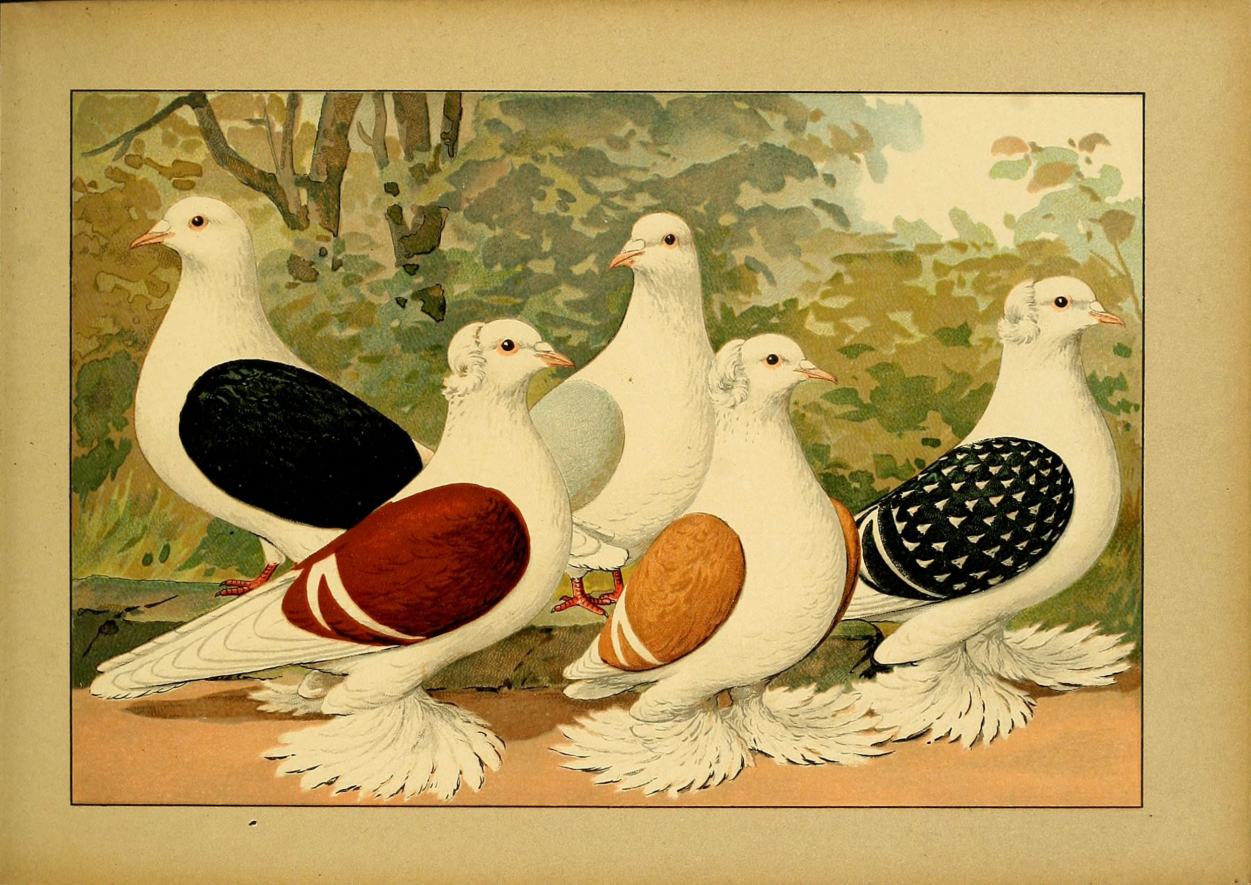 Deutsch